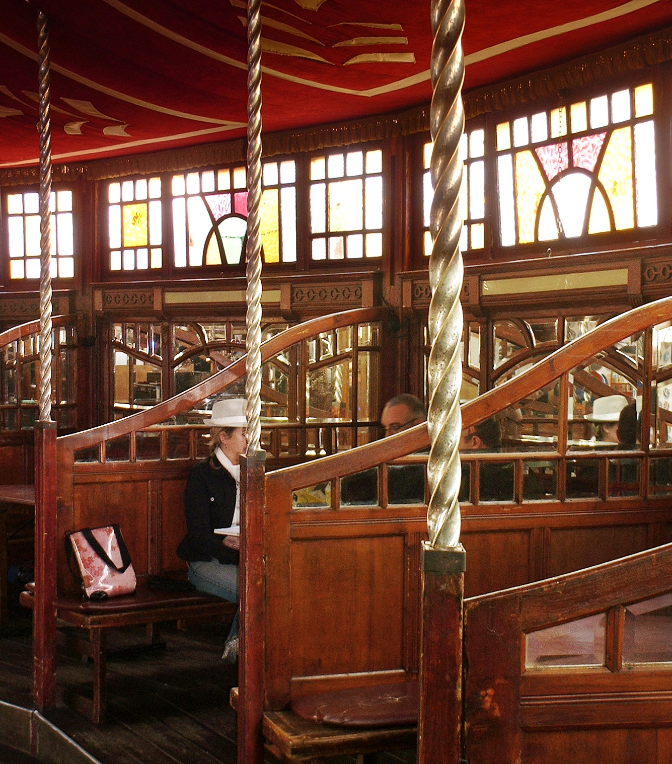 The Grand Spiegeltent Seating Booths